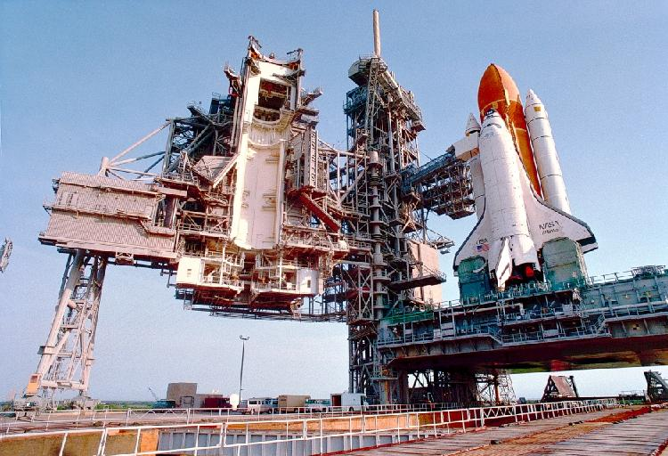 Space Shuttle Atlantis op Lanceerplatform